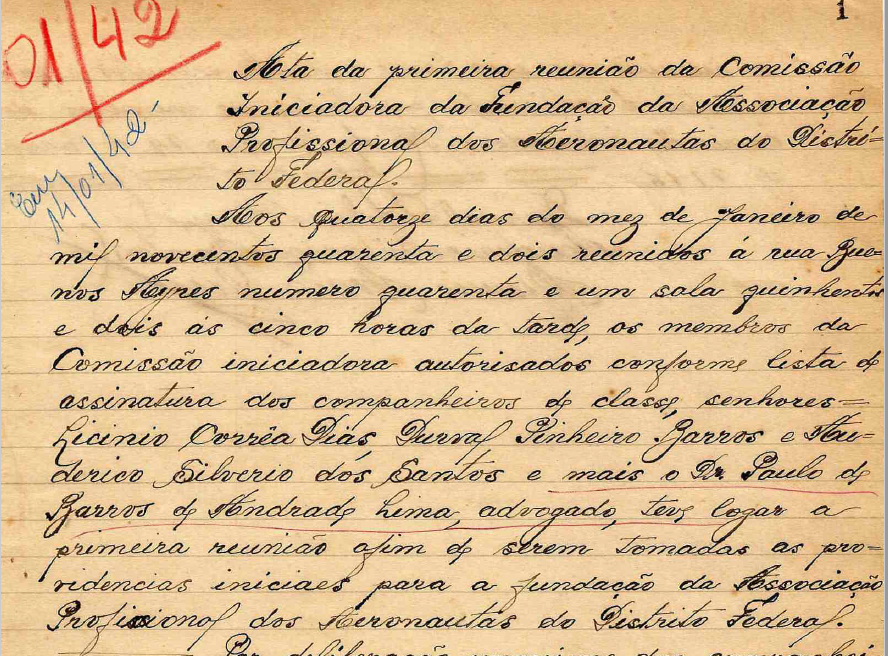 Datado de 14 de janeiro de 1942, o documento corresponde a ata da primeira reunião para a fundação da Associação Profissional dos Aeronautas do Distrito Federal, ainda no Rio de Janeiro - RJ, Brasil. Mais tarde, a associação viria a ser o Sindicato Nacional dos Aeronautas.